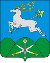 Герб Кавказского района Краснодарского края